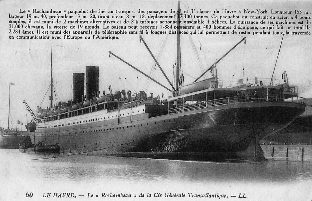 Le Rochambeau, Paquebot a turbine, Compagnie Générale Transatlantique, vintage postcard